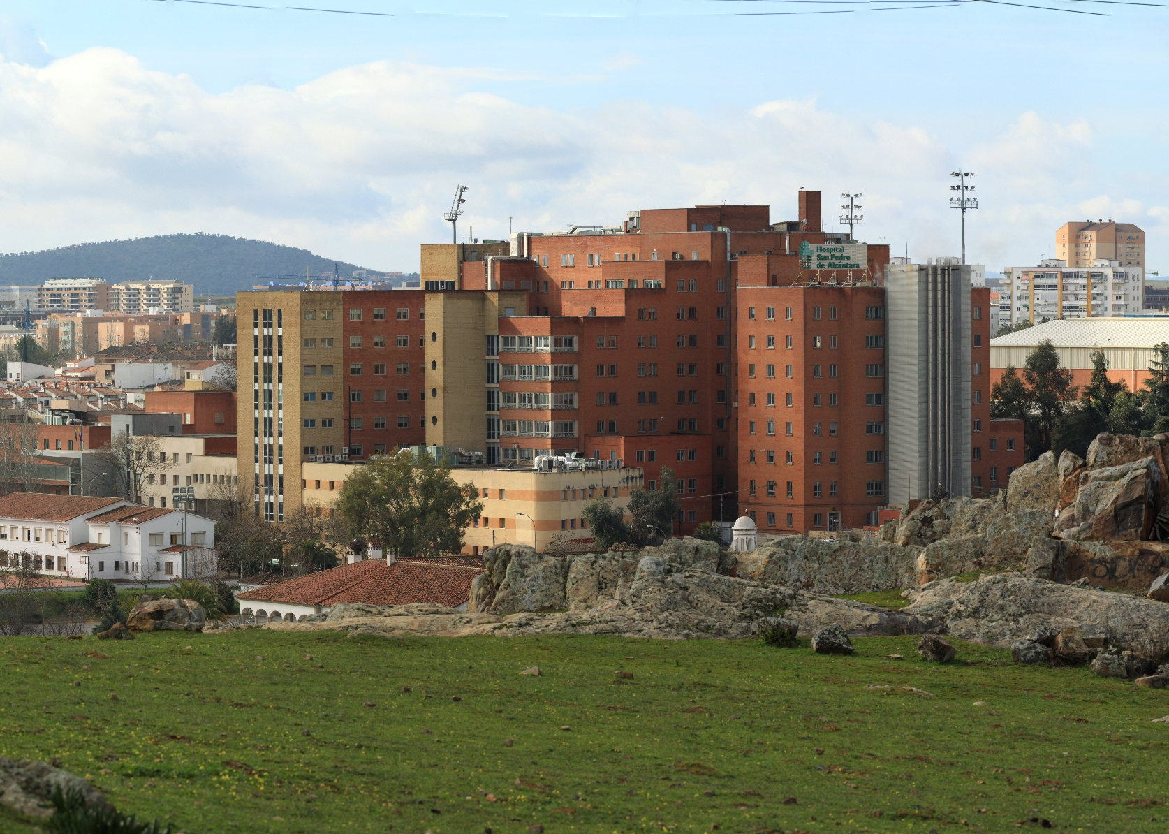 Hospital San Pedro de Alcántara, Cáceres, España.